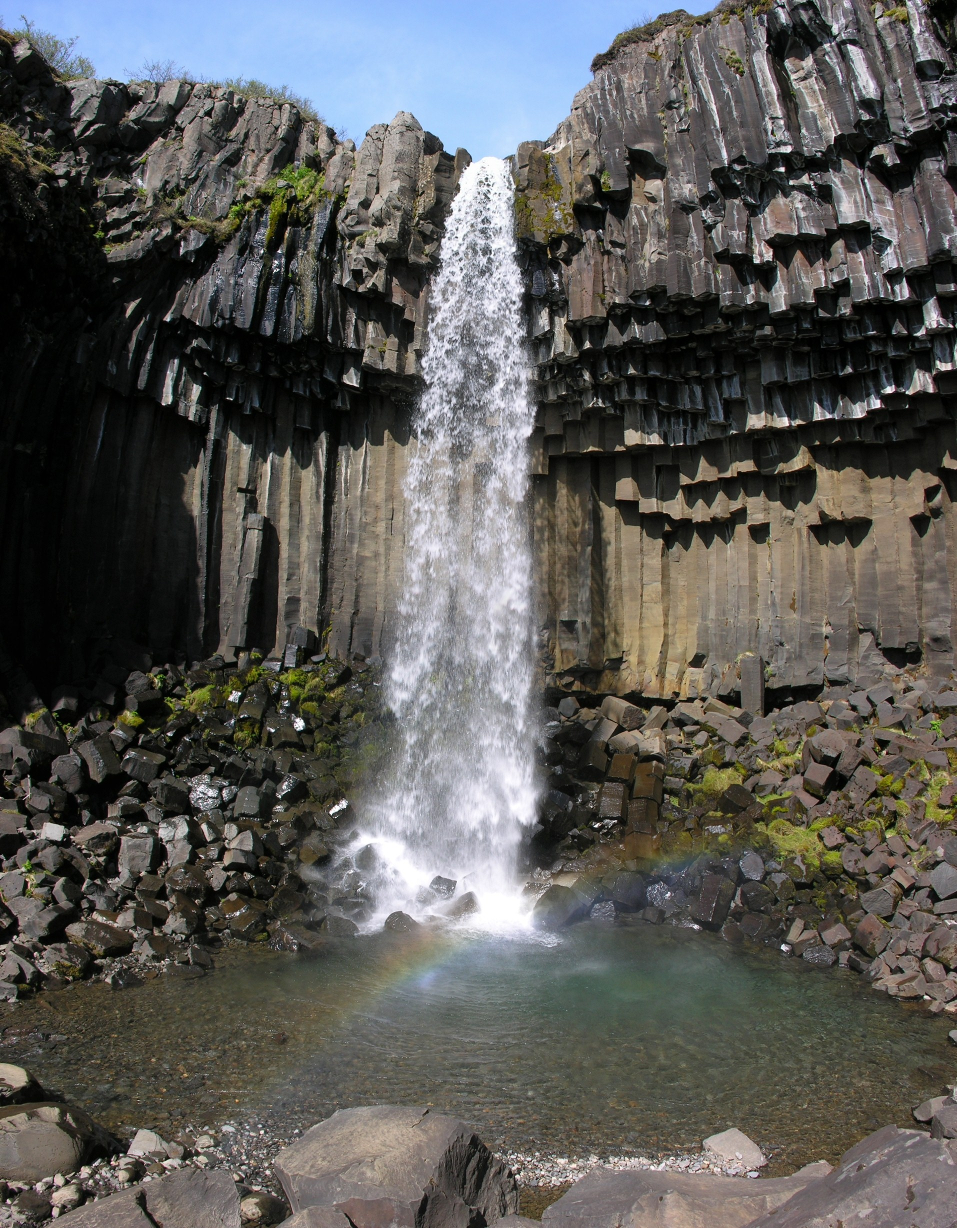 Iceland, Svartifoss